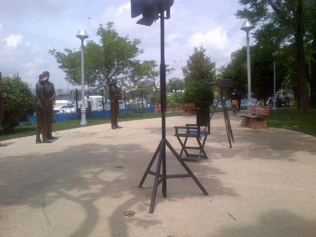 Parte del monumento a "Yeşilçam" (cine turco) en Fenerbahçe, Kadıköy, Istanbul.